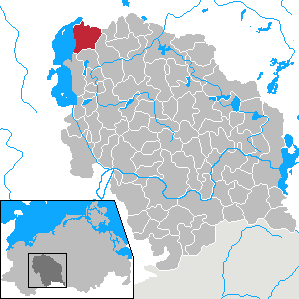 Dobin am See in Mecklenburg-Vorpommern - District Parchim